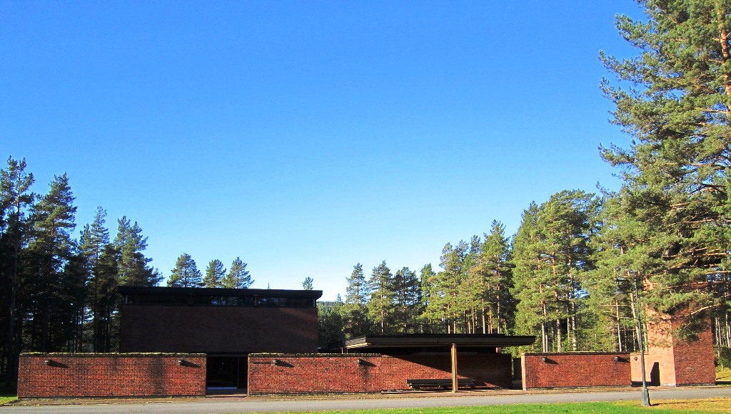 Kapellet på Kongsberg gravlund, ofte kalt Gomsrud kapell. Krematoriet er ikke lenger i bruk.